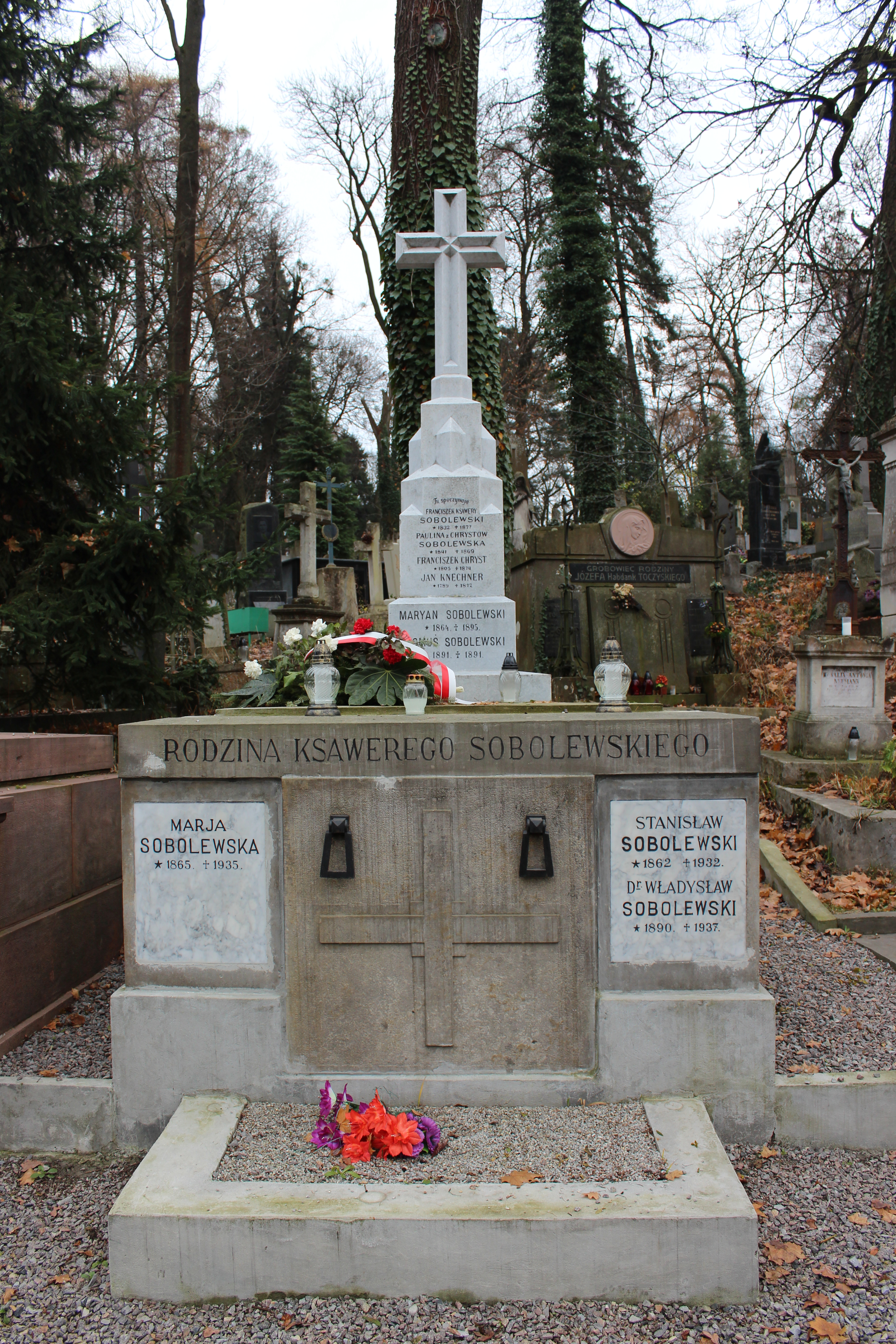 Гробівець родини Соболевських. Личаківський цвинтар , поле № 2.